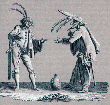 Pantalon und Giglio aus Prinzessin Brambilla: „Bester Signor“, redete Pantalon (so wollen wir die Maske, trotz des veränderten Kostüms, nennen) den Giglio an, „mein bester Signor! ein glücklicher Tag, der mir das Vergnügen, die Ehre schenkt, Sie zu erblicken! Sollten Sie nicht zu meiner Familie gehören?“ „Sosehr“, erwiderte Giglio, sich höflich verbeugend, „sosehr mich das entzücken würde, da Sie, mein bester Signor, mir über alle Maßen Wohlgefallen, so weiß ich doch nicht, in welcher Art irgendeine Verwandtschaft -“ „O Gott!“ unterbrach Pantalon den Giglio, „o Gott! bester Signor, waren Sie jemals in Assyrien?“ „Eine dunkle Erinnerung“, antwortete Giglio, „schwebt mir vor, als sei ich einmal auf der Reise dahin begriffen gewesen, aber nur bis nach Frascati gekommen, wo der Spitzbube von Vetturin mich vor dem Tore umwarf, so daß diese Nase -“ „O Gott!“ schrie Pantalon, „so ist es denn wahr? - Diese Nase, diese Hahnfedern - mein teuerster Prinz - o mein Cornelio! - Doch ich sehe, Sie erbleichen vor Freude, mich wiedergefunden zu haben - o mein Prinz! nur ein Schlückchen, ein einziges Schlückchen!“